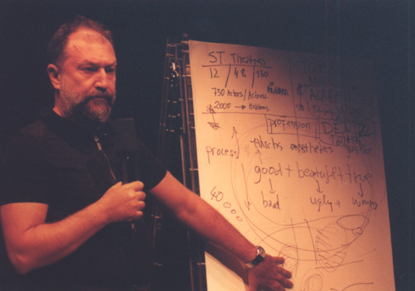 Sırbistan'da yapılan Bienal 2000 etkinliğinde yaptığı sunudan